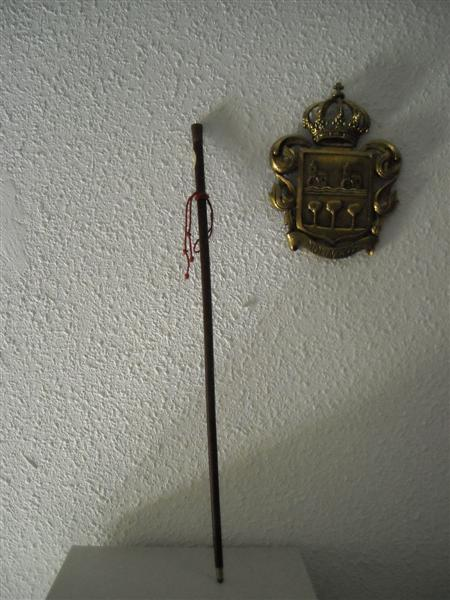 Bastón de mando del alcalde de Molinicos (Albacete), junto al escudo municipal.